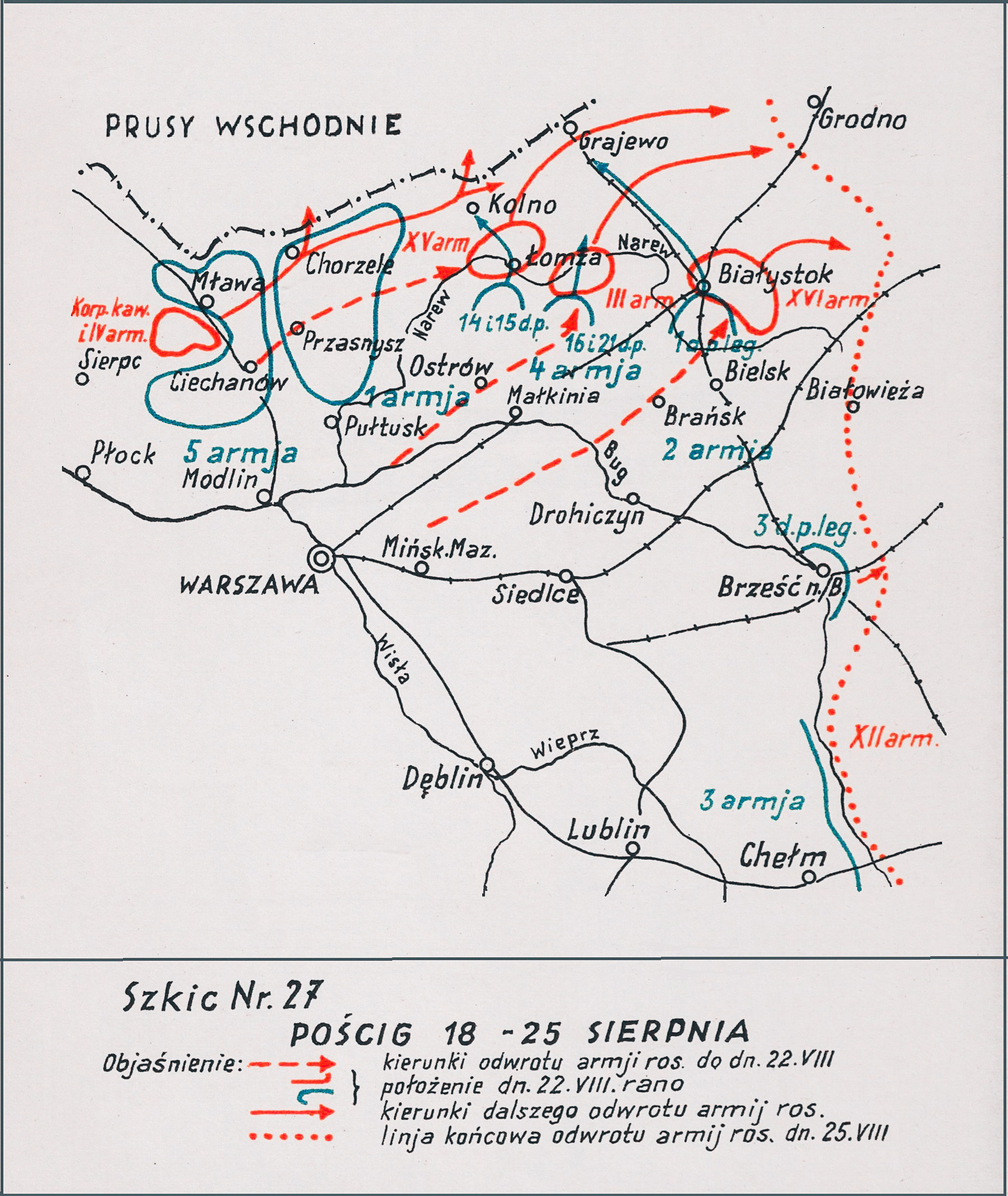 Pościg 18 – 25 sierpnia 1920. Adam Przybylski, Wojna Polska 1918 ― 1921; Szkic Nr 27.